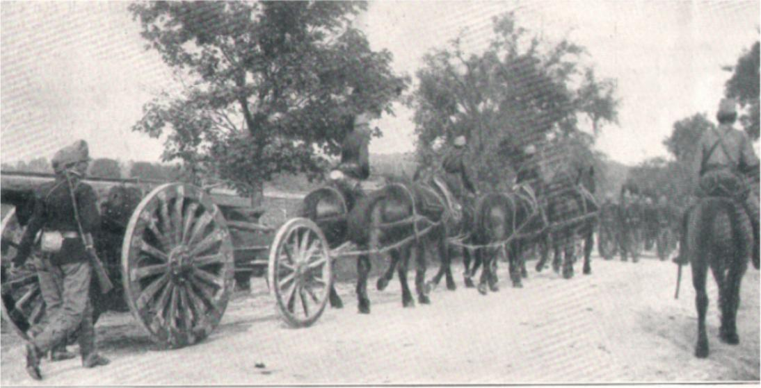 k.u.k. Festungsartillery auf dem Marsch